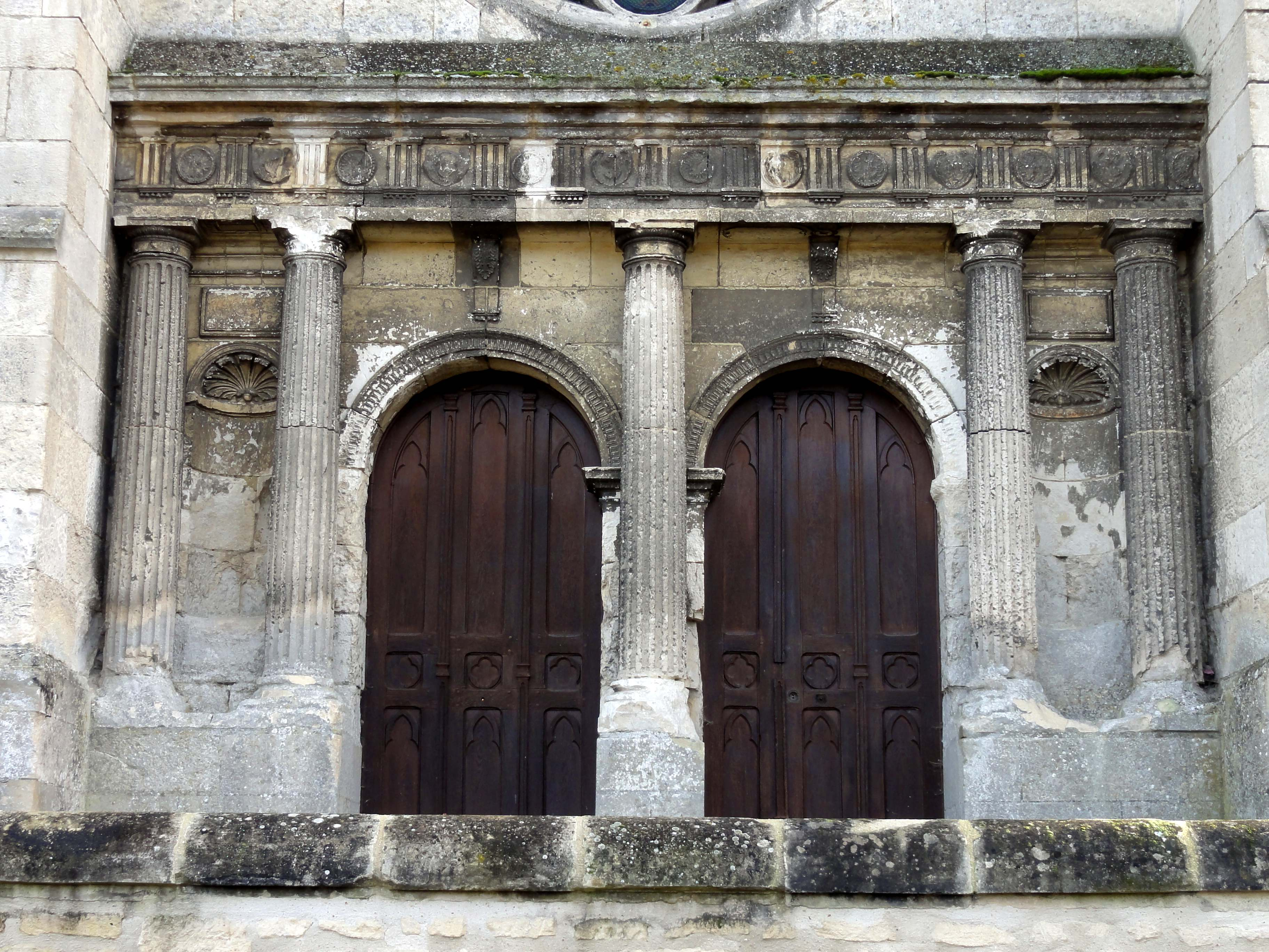 Portail occidental.